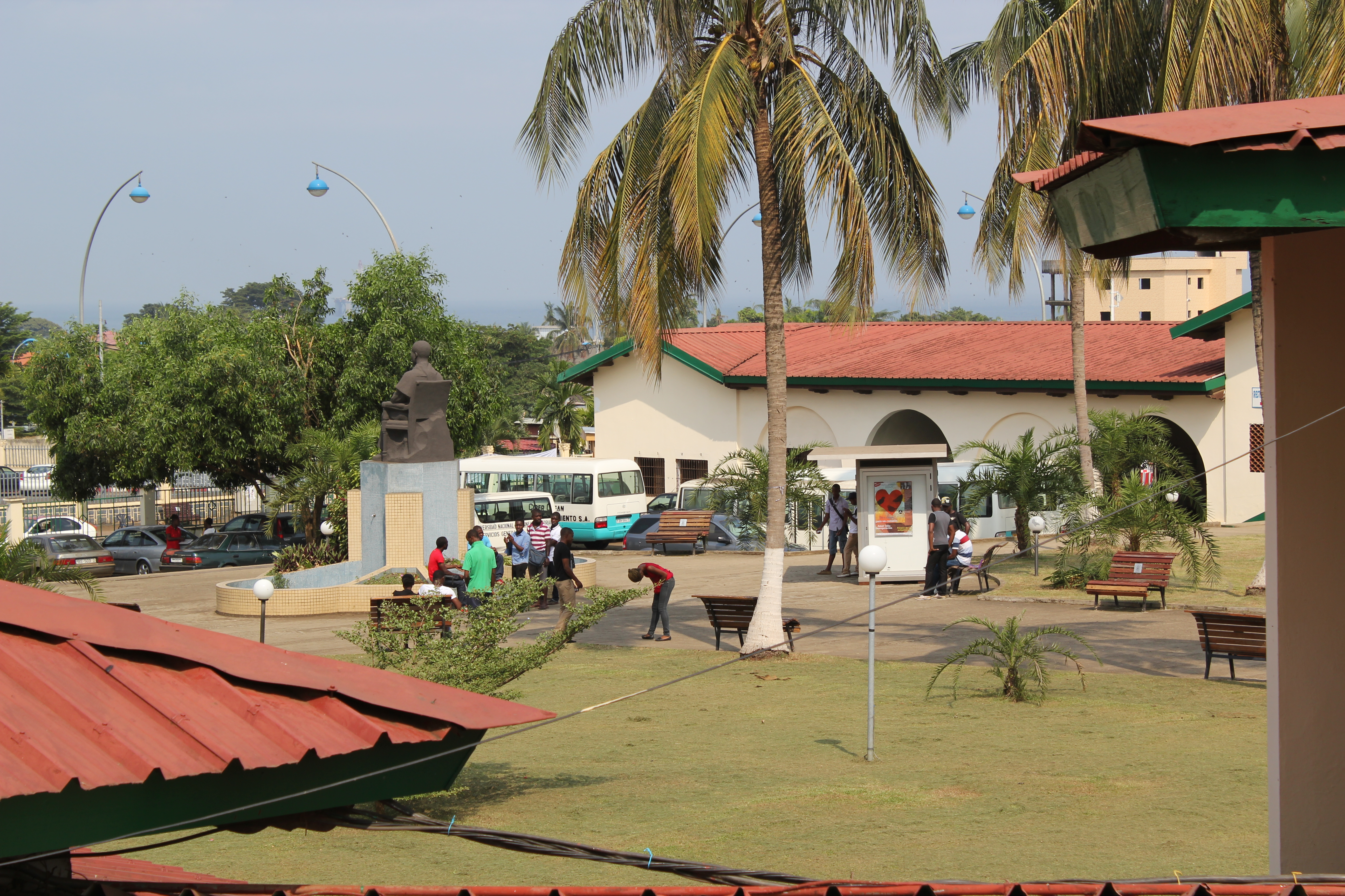 30 años de la UNED en Guinea Ecuatorial (2011)